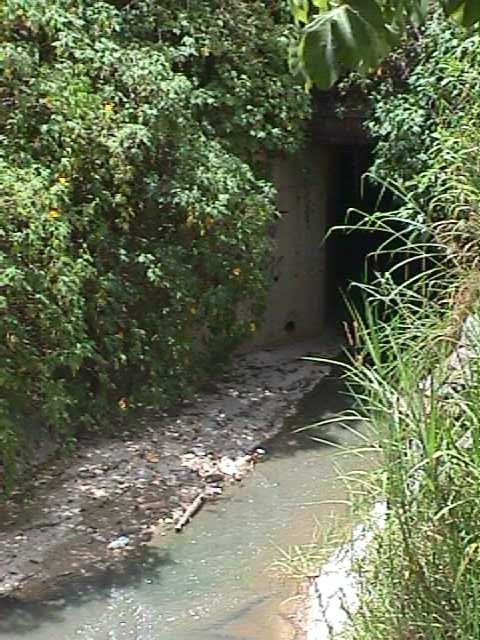 Boca de la quebrada La Boyera